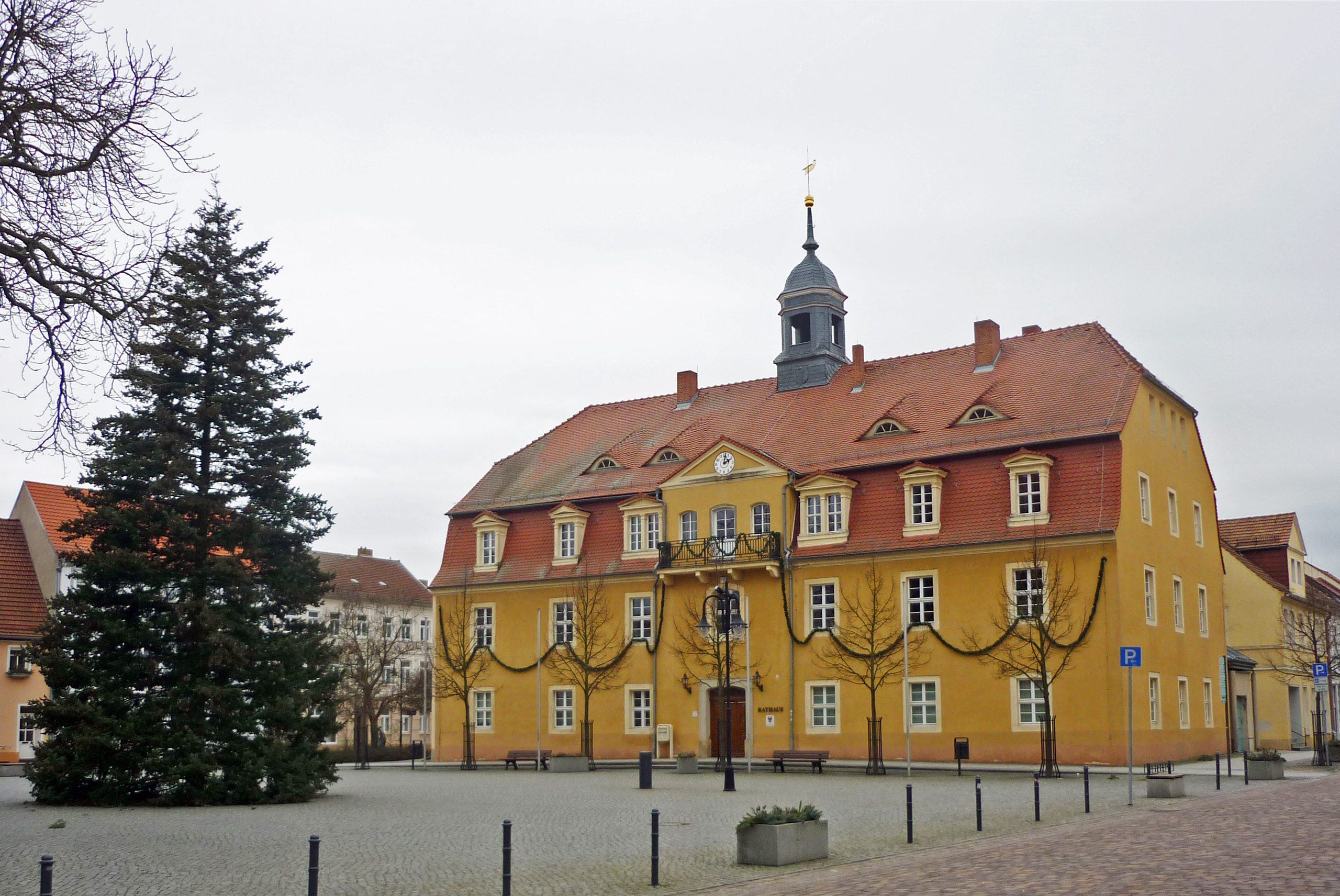 Rathaus am Markt in Bad Liebenwerda